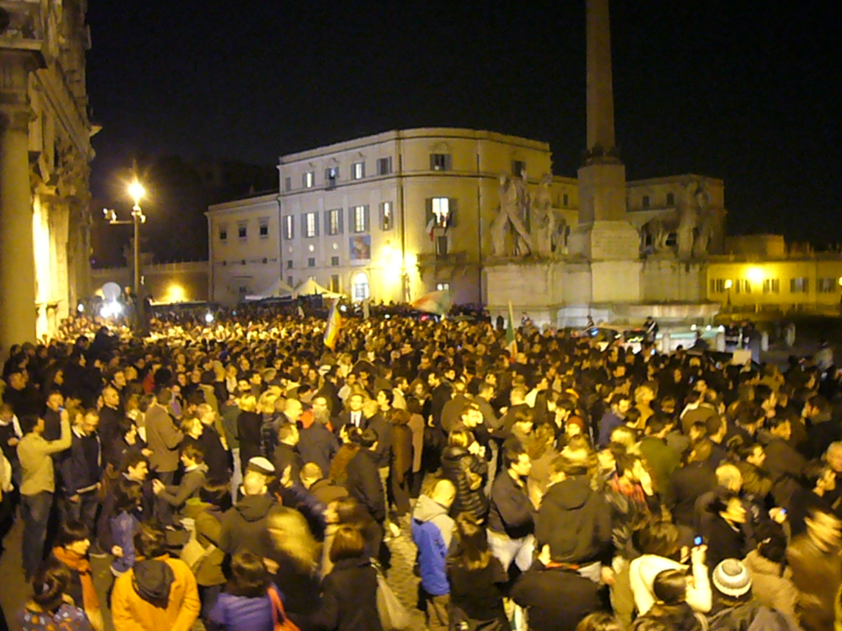 Roma, piazza del Quirinale, 12 novembre 2011. La folla aspetta Berlusconi che deve andare al Quirinale a dimettersi.